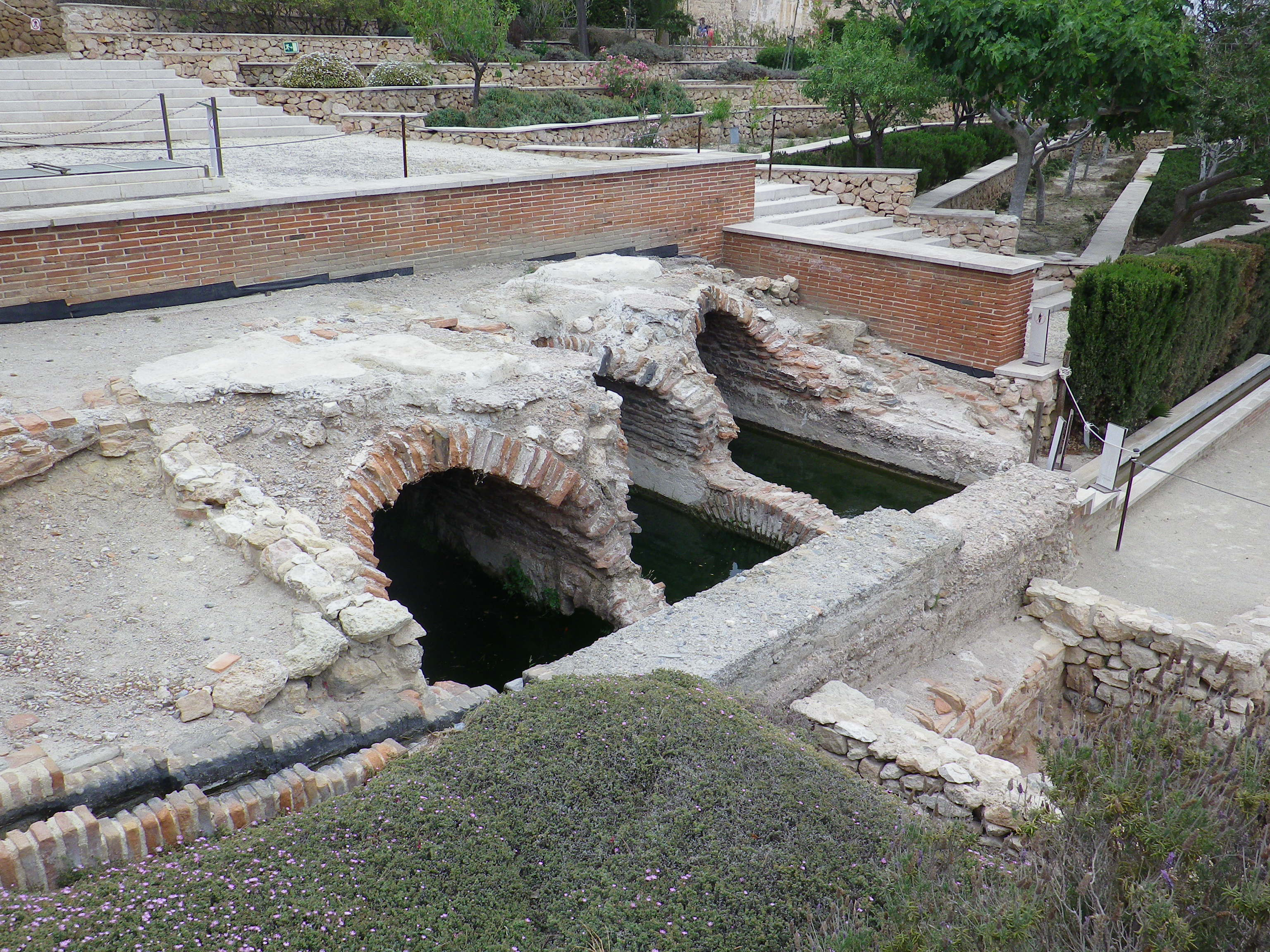 Estado actual de los aljibes o depósitos de agua en el segundo recinto de la Alcazaba de Almería.